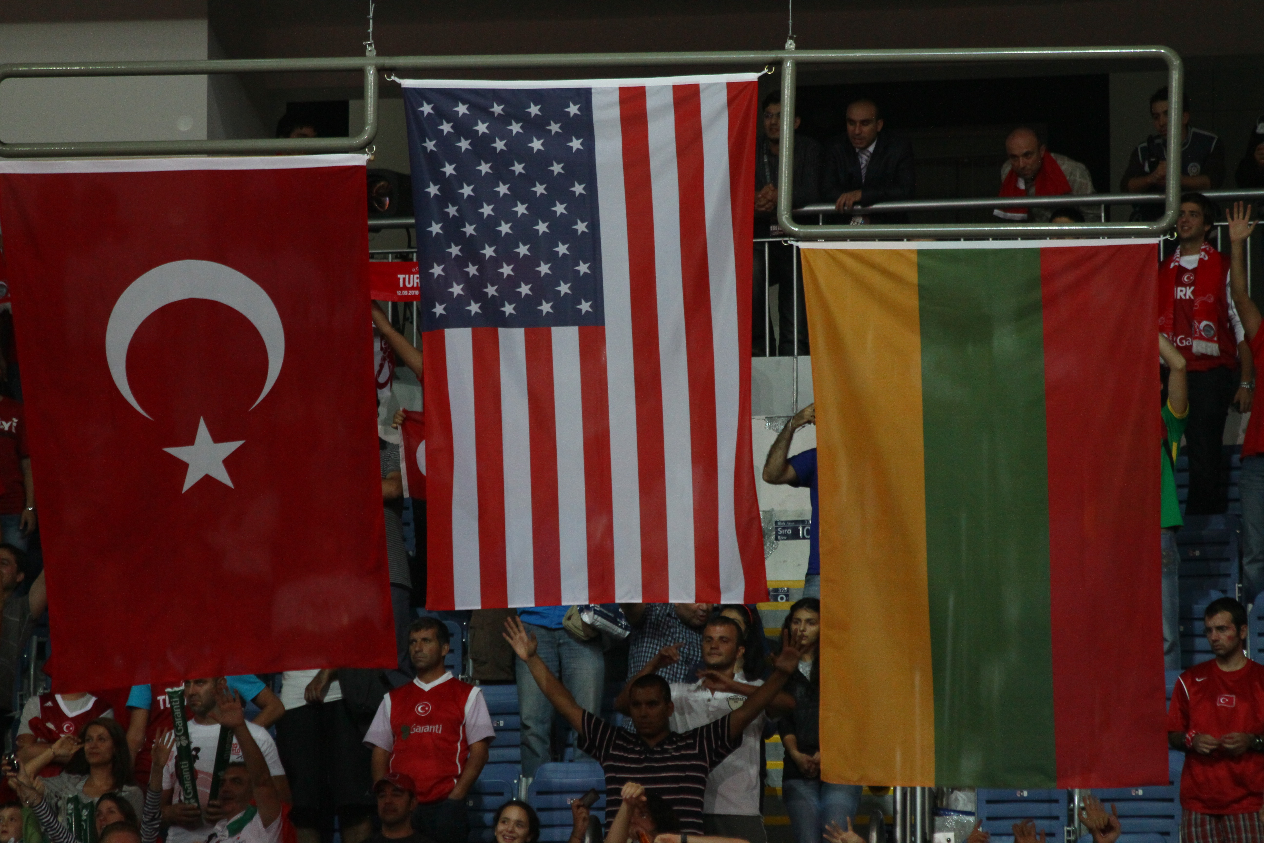 Banderas de Estados Unidos, Turquía y Lituania, países que consiguieron las tres primeras posiciones en el Campeonato Mundial de baloncesto 2010.